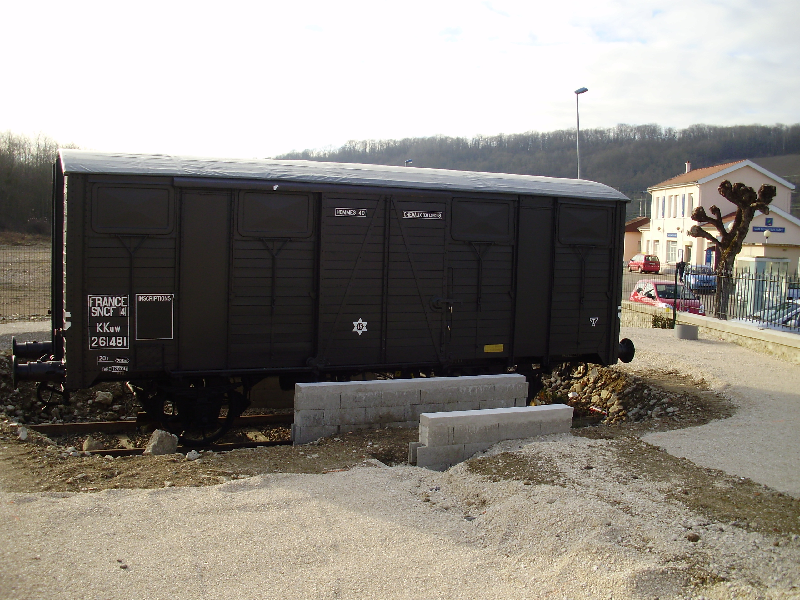 Gare de Nanteuil - Saâcy, à Saâcy-sur-Marne, Seine-et-Marne, France : wagon-souvenir du mémorial installé près du passage à niveau (février 2012 : installation en cours de finalisation)